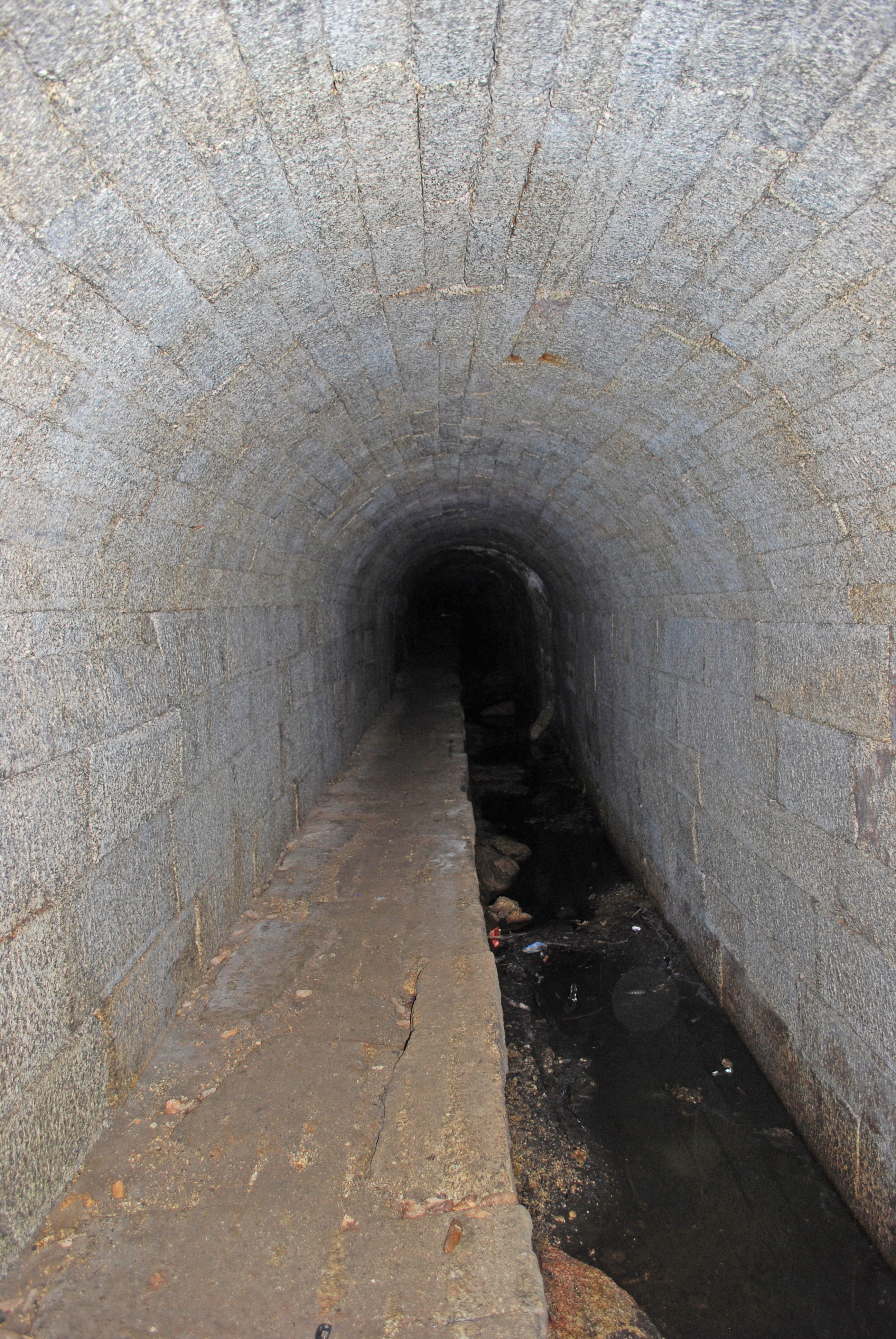 Tunnel Schwemmkanal, Blick aus dem oberen Portal